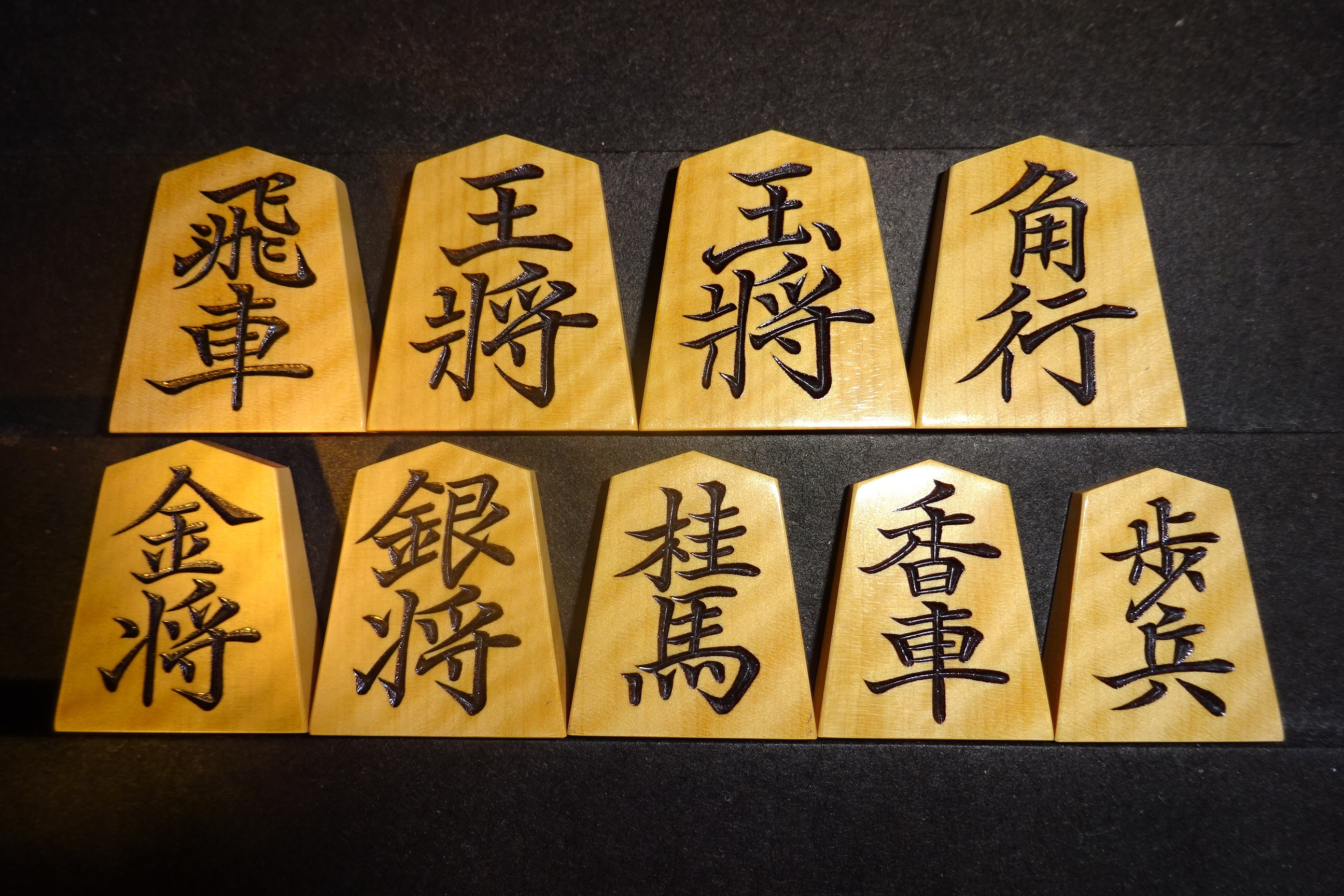 蜂須賀作 菱湖 島黄楊 虎斑 彫駒